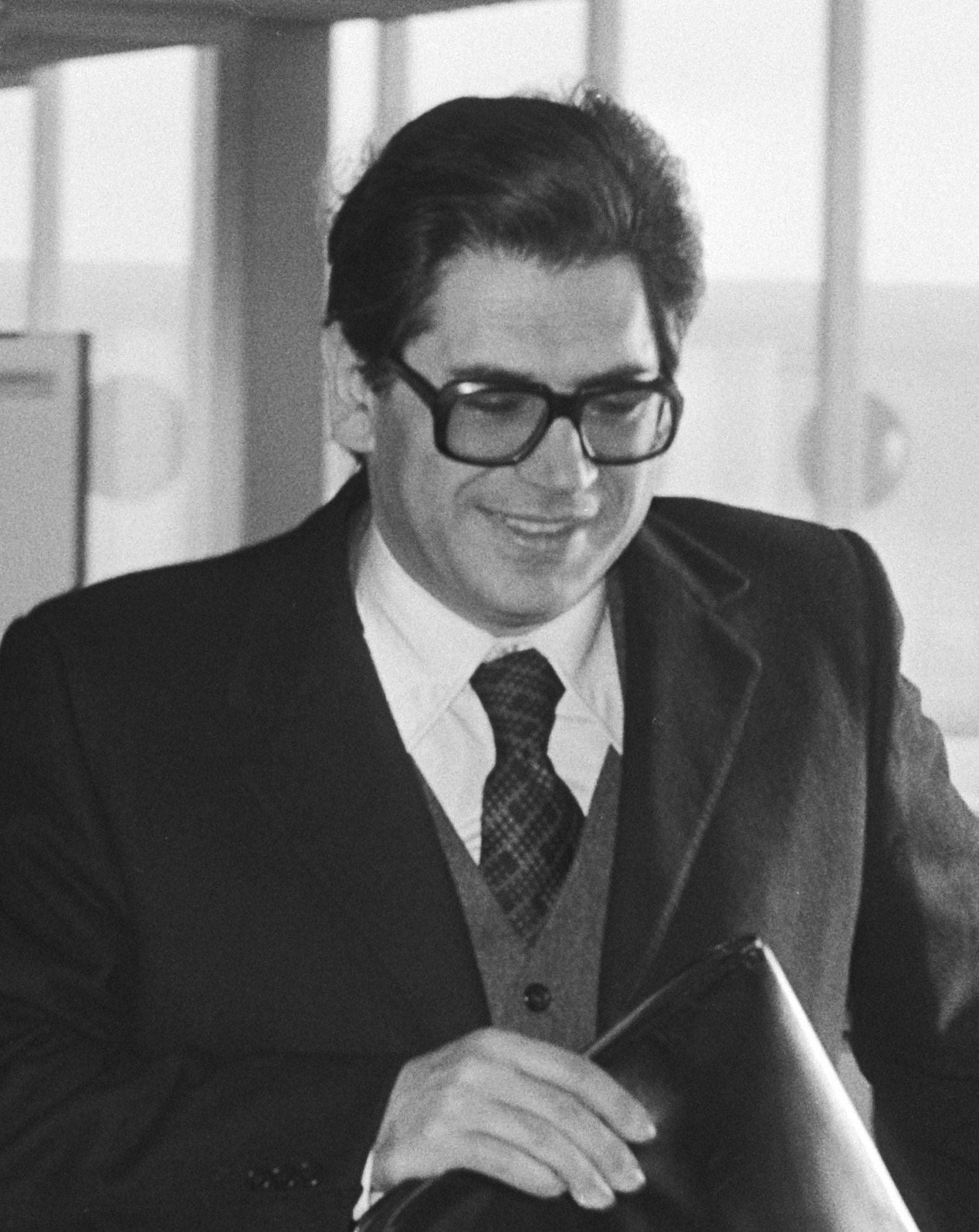 Aankomst op Schiphol van een Portugelse parlementsdelegatie. Vice-voorzitter Antonio Duarte Arnaut (r) wordt begroet door Vondeling